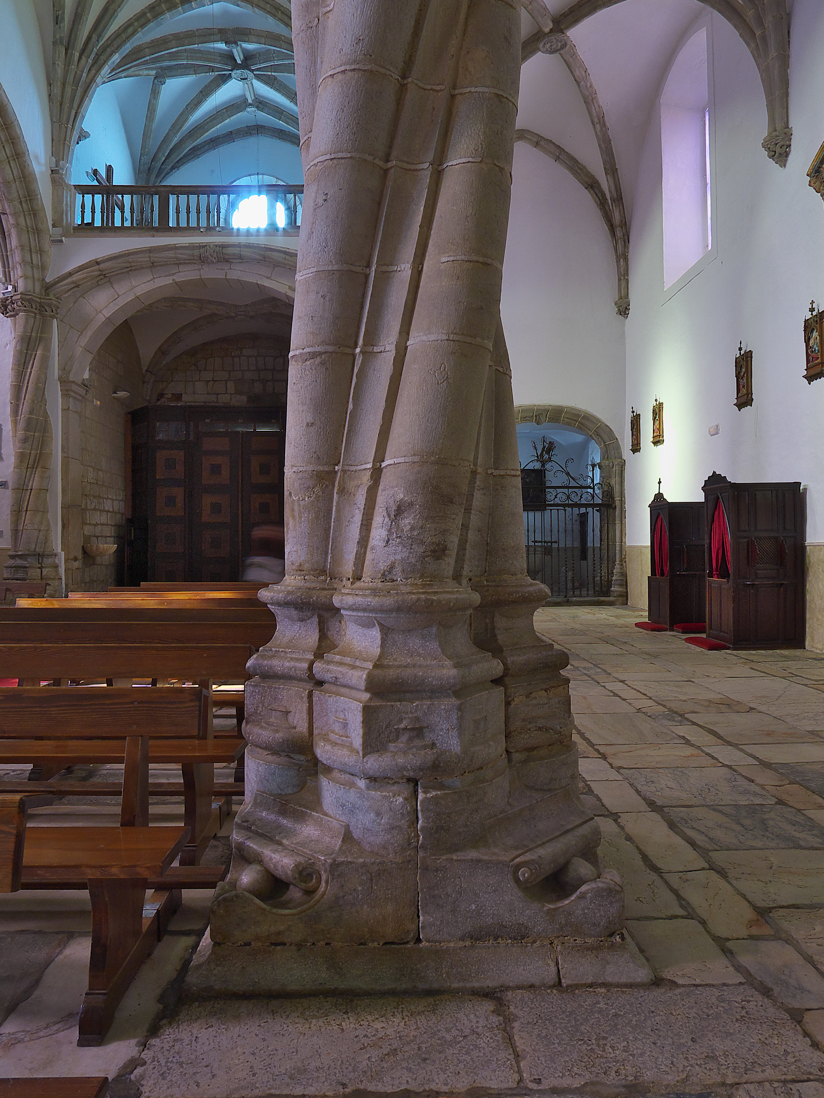 Basa de mármol de un pilar de la iglesia.